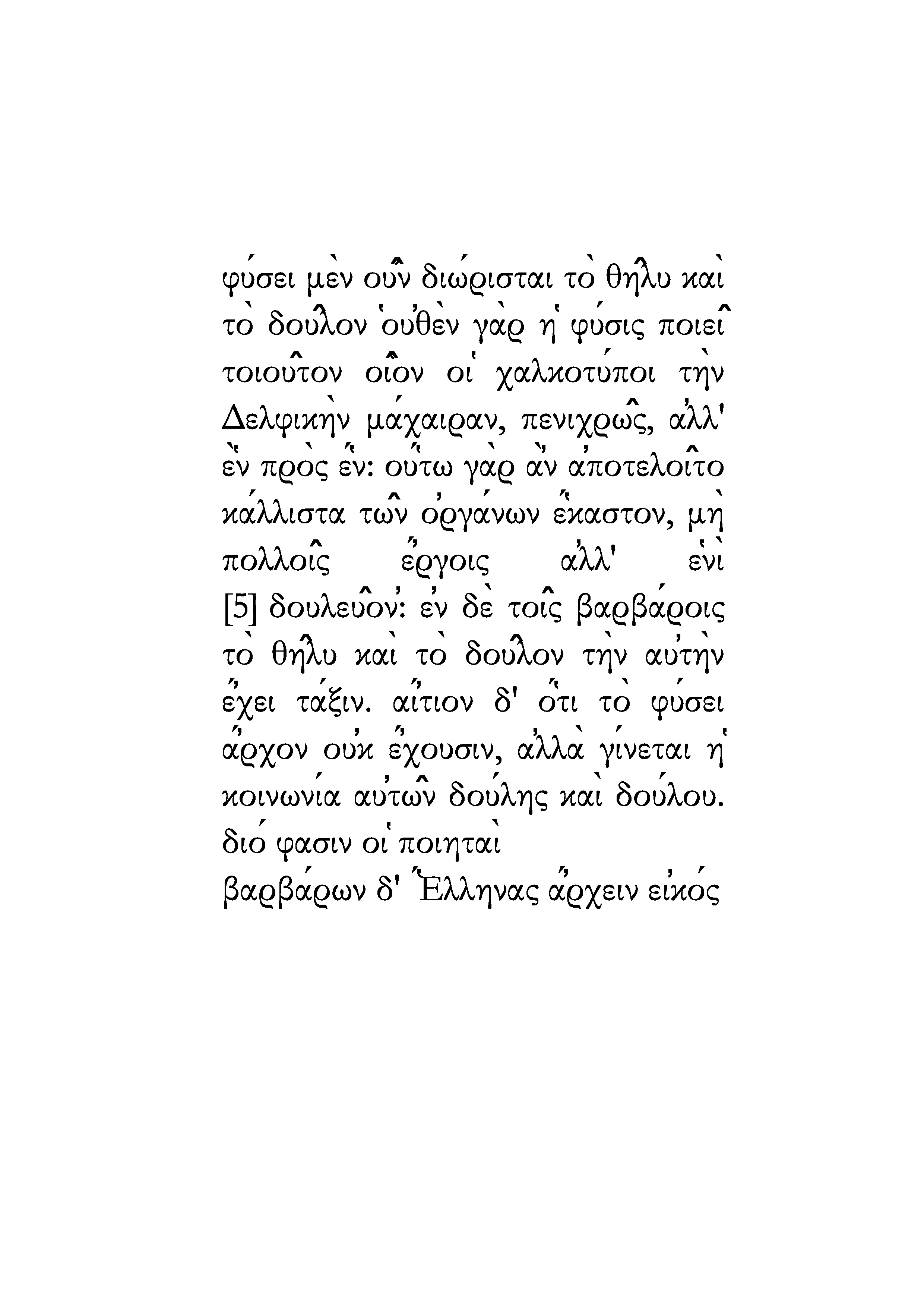 Photo-reproduction du texte d'Aristote - Les Politiques, Livre I, 1252a